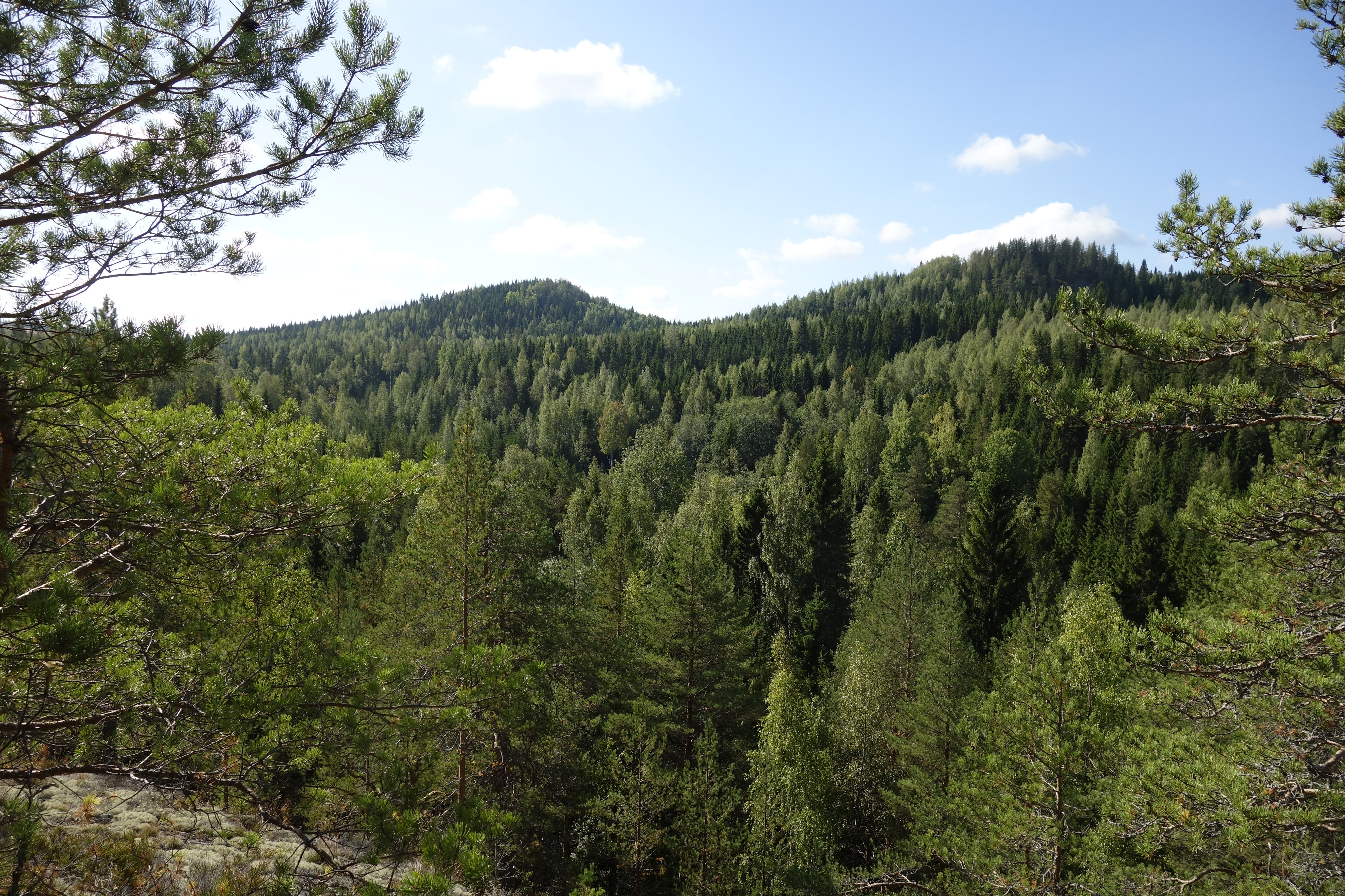 Pieni Honkavaara (vasemmalla) ja Honkavaara Lieksassa, Pohjois-Karjalassa, Suomessa. Kuvattu Kolvanankalliolta.